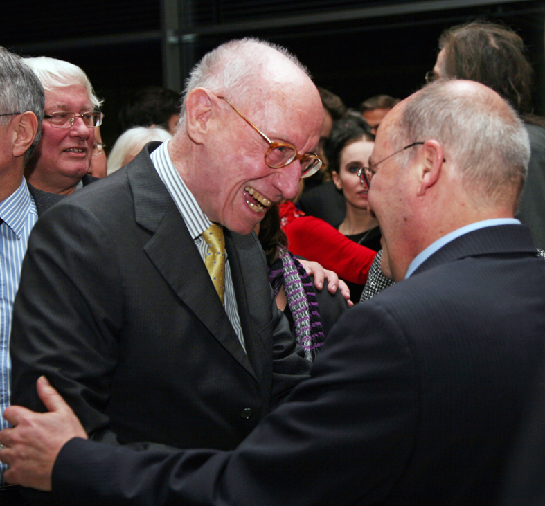 Geburtstagsempfang zum 65. von Gregor Gysi im Reichstagsgebäude